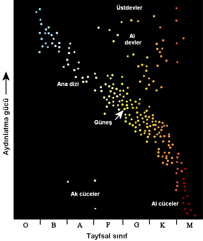 kaynak